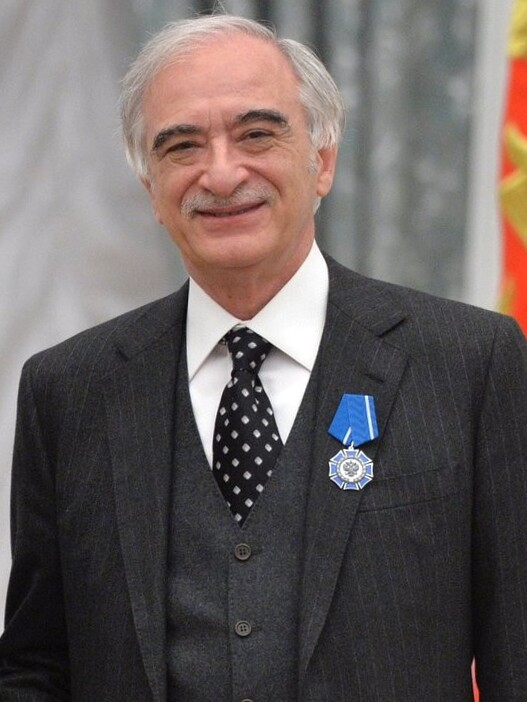 Полад Бюльбюль-оглы